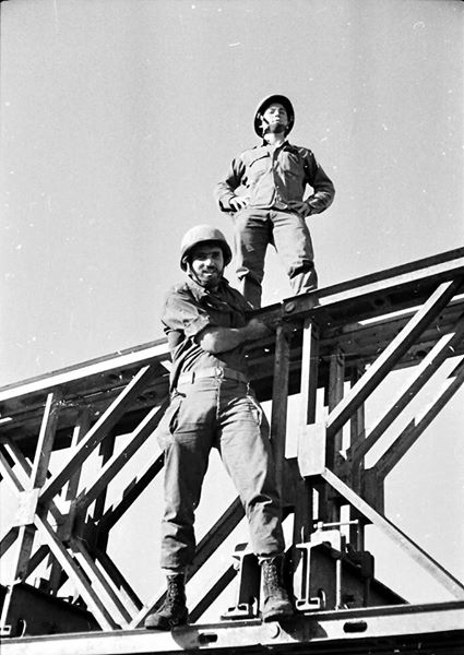 חיילי הנדסה קרבית בבניית גשר "ביילי" 5